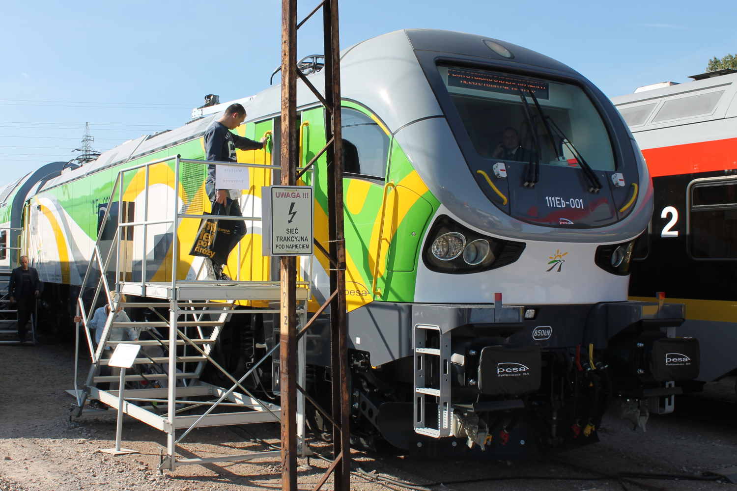 Elektrowóz Pesa Gama 111Eb-001 podczas targów Trako 2015. The making of this document was supported by Wikimedia Polska Association, within Wikigrant no. WG 2015-34. English | polski | +/−